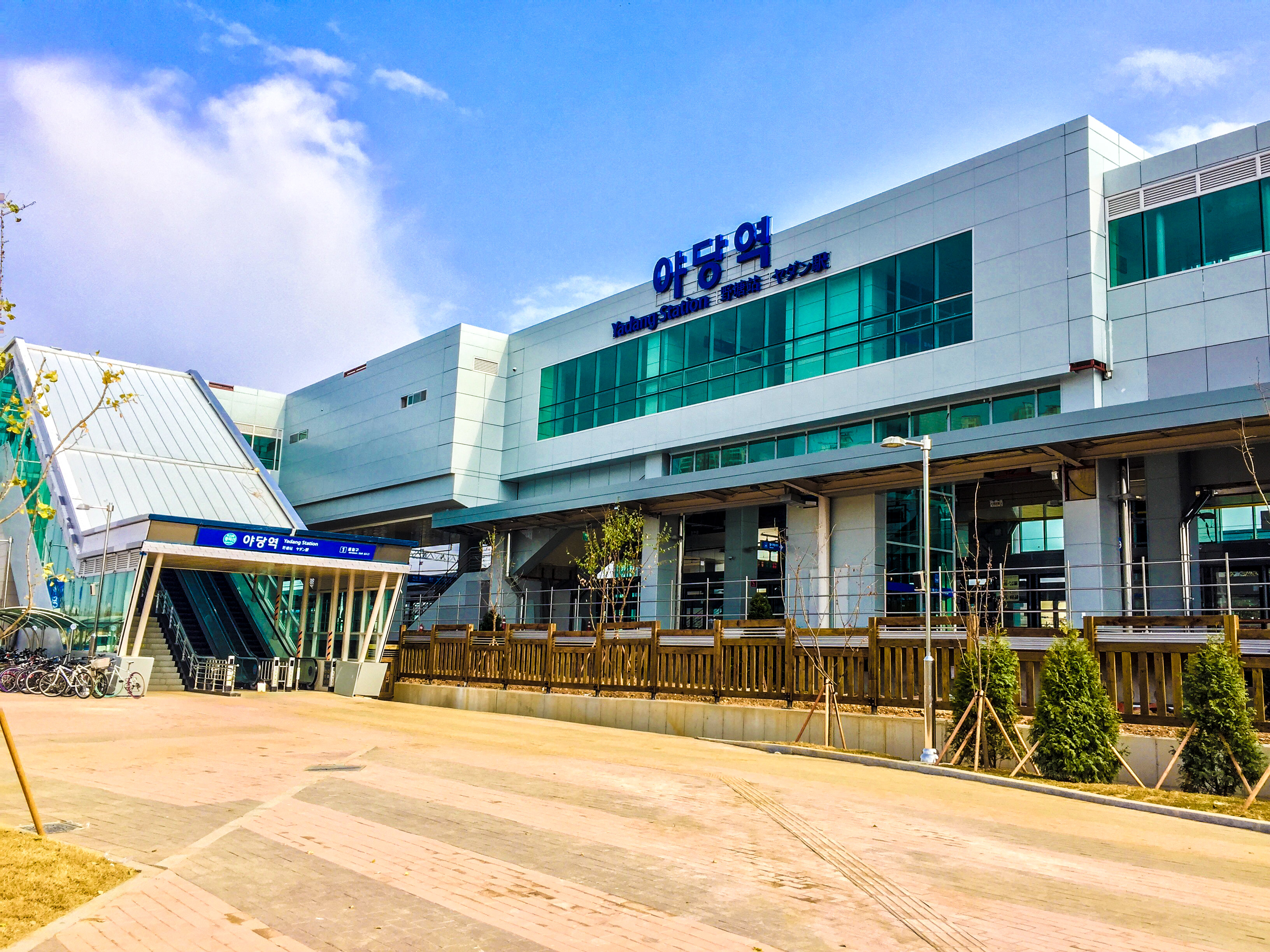 야당역 1번 출입구